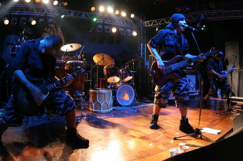 Grupo Revolucionnários durante apresentação.